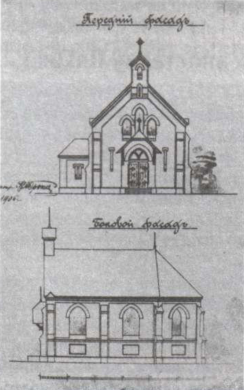 Беларуская (тарашкевіца): Градзічы (Hrandzičy). Праект каталіцкай капліцы